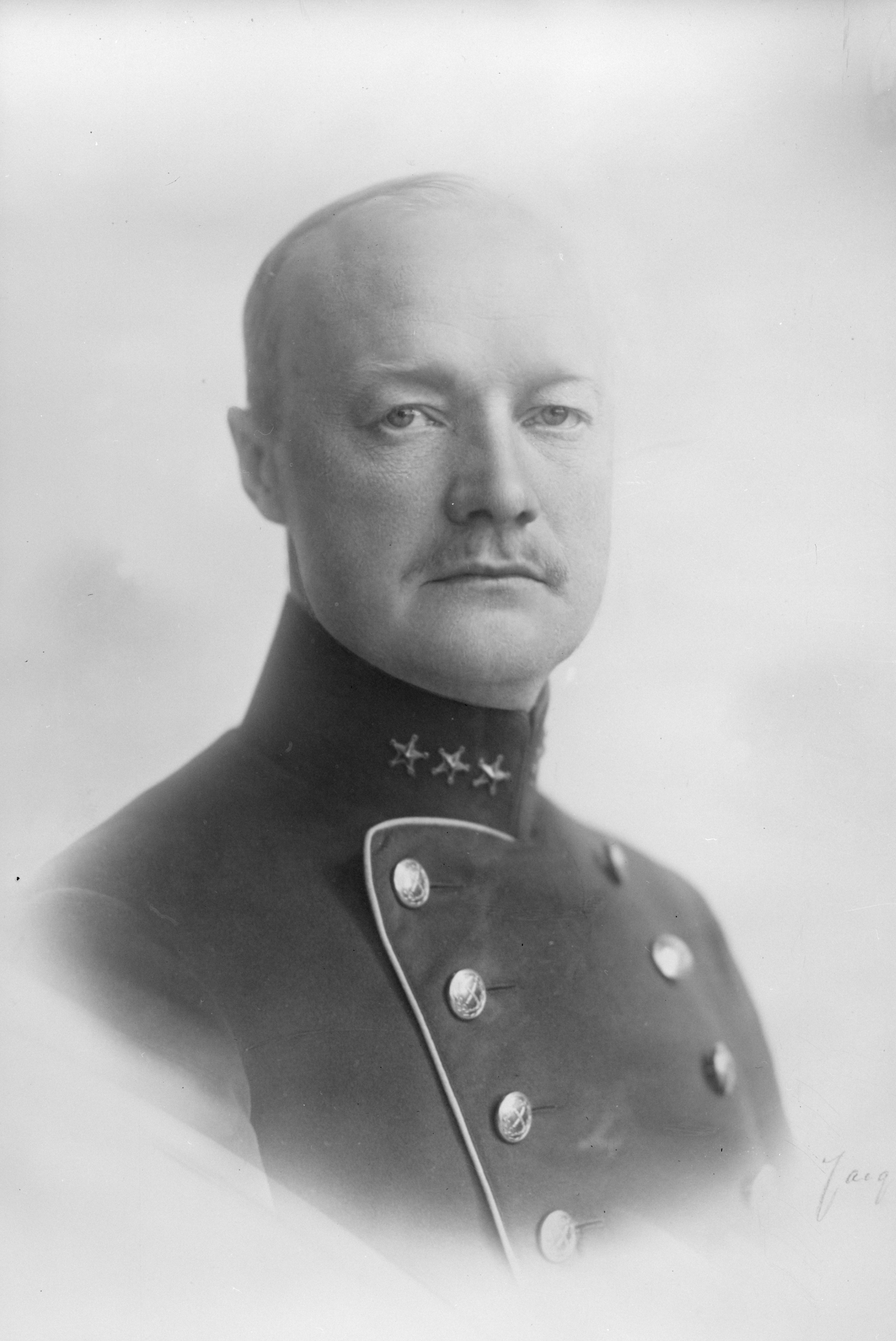 Motiv: Porträtt av militära flygpionjären, kapten Ove Sylvan från Generalstaben. Tillhör Gamla Malmen-samlingen. GM 1048. Ur Flygvapenmuseums bildarkiv.